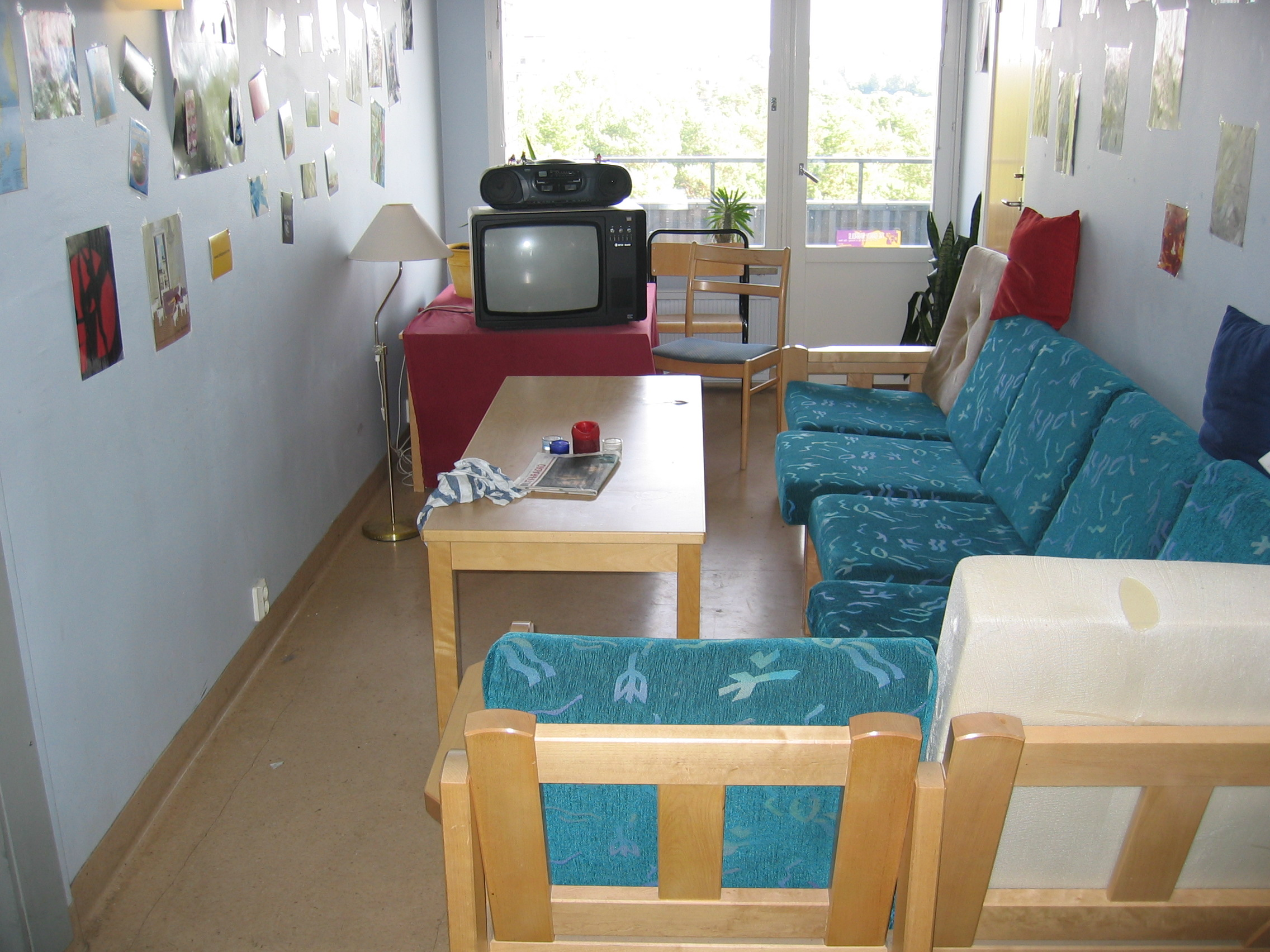 Common Room in Flogsta Studentstaden